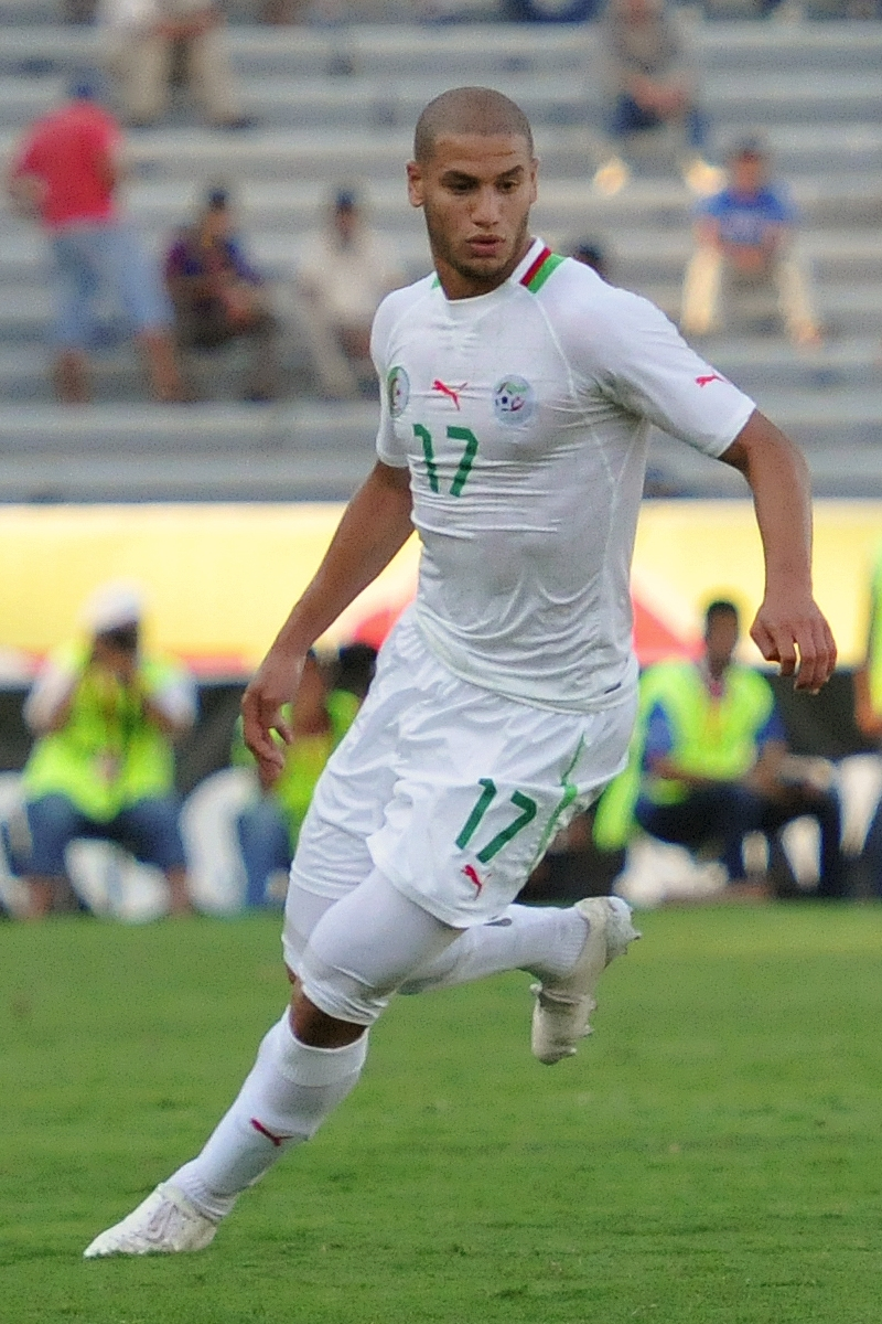 Adlène Guedioura sous le maillot de l'équipe d'Algérie lors du match aller du deuxième tour des qualifications à la CAN 2013, face à la Libye, à Casablanca (Maroc). This file has been extracted from another file: Libye - Algérie2.jpg